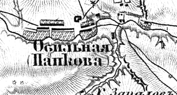 Изображение села на схеме